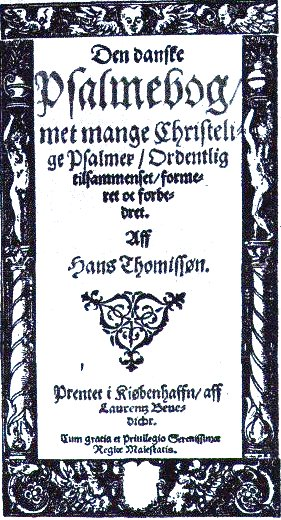 Forsiden til Thomissøns salmebok